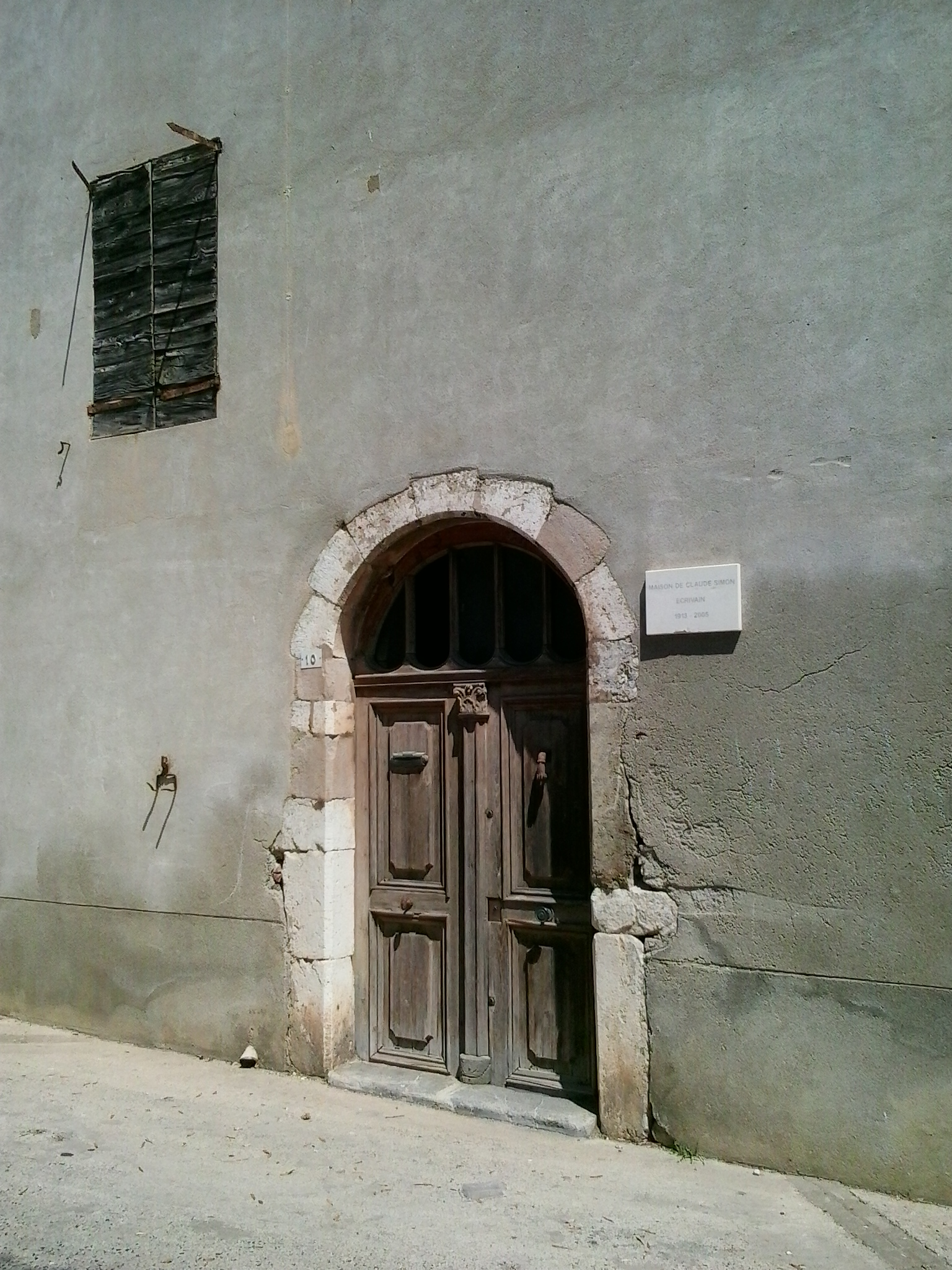 Détail de la maison de Claude Simon à Salses-le-Château